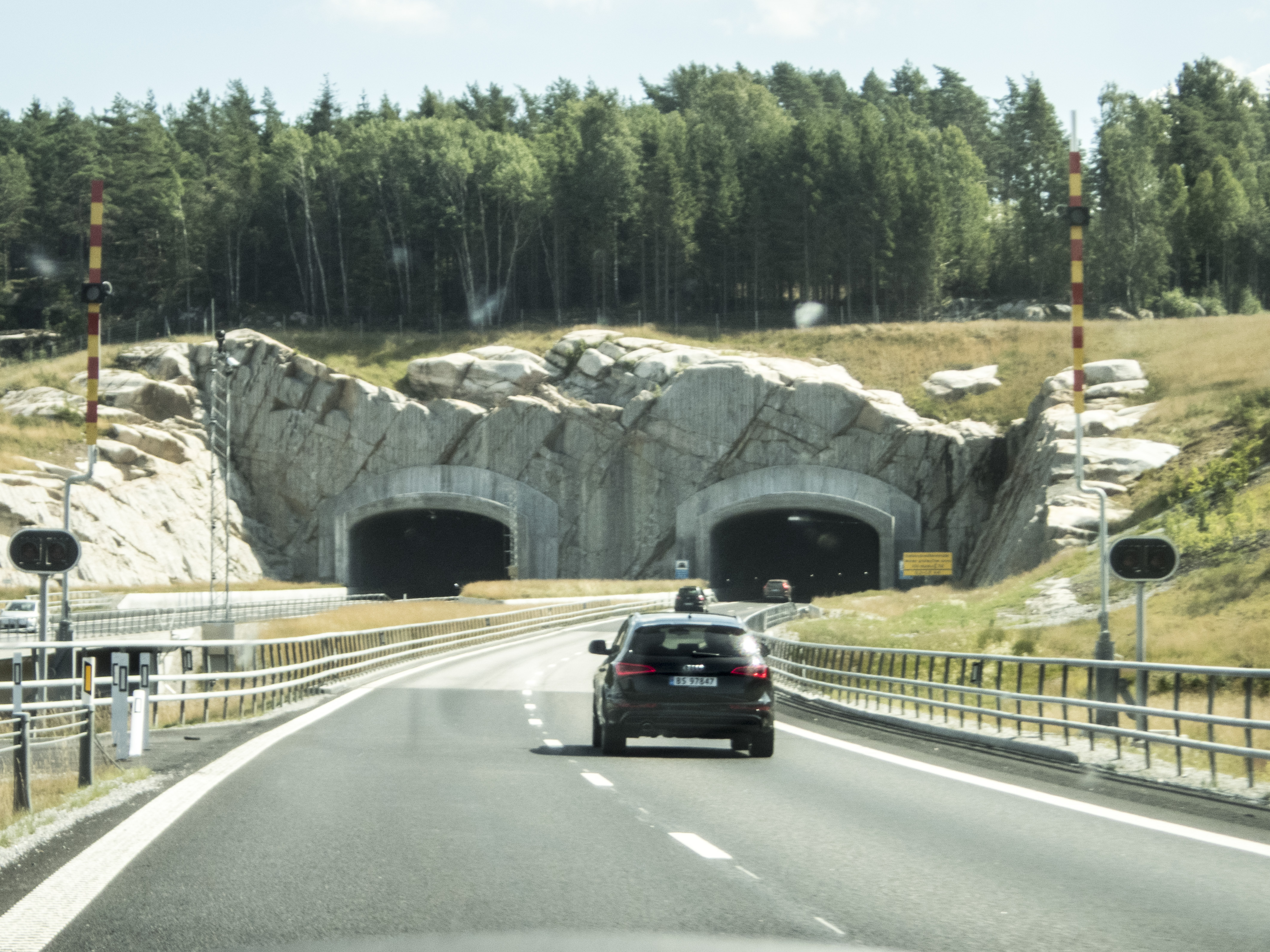 Gerumstunneln, E6, Tanums kommun. Invigd 2015